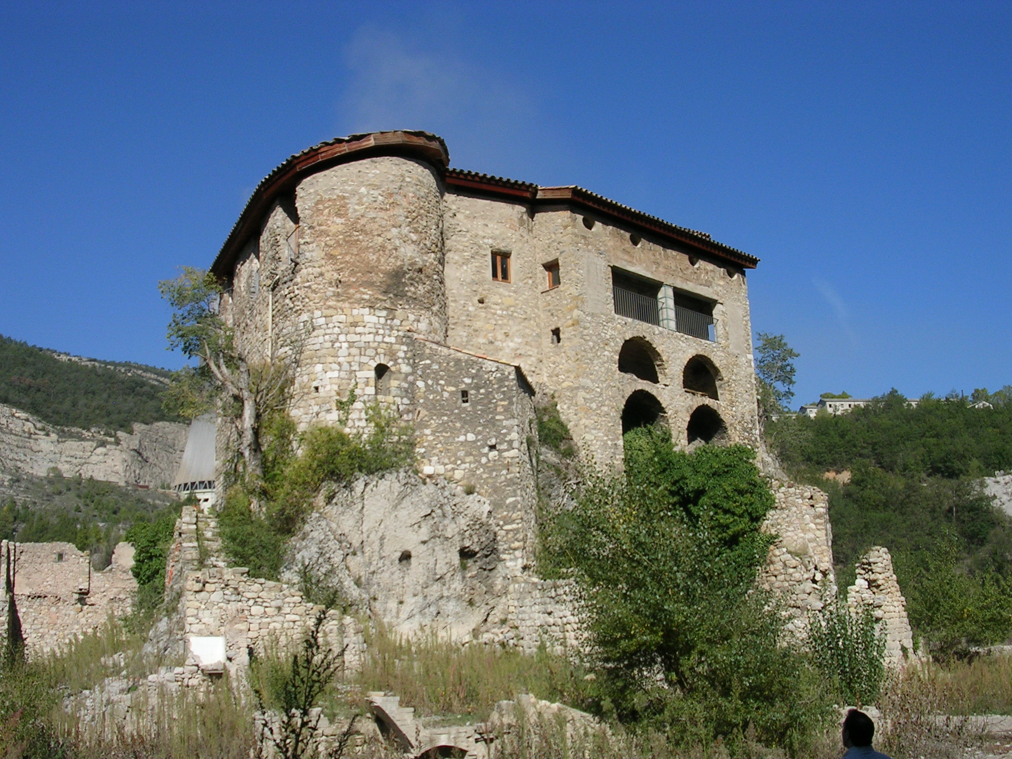 Edifici singular fundat l’any 830 pels monjos de Sant Serni de Tavérnoles, és l’únic que queda dempeus de l’antic poble de Sant Salvador de la Vedella, inundat per les aigües del pantà de La Baells.